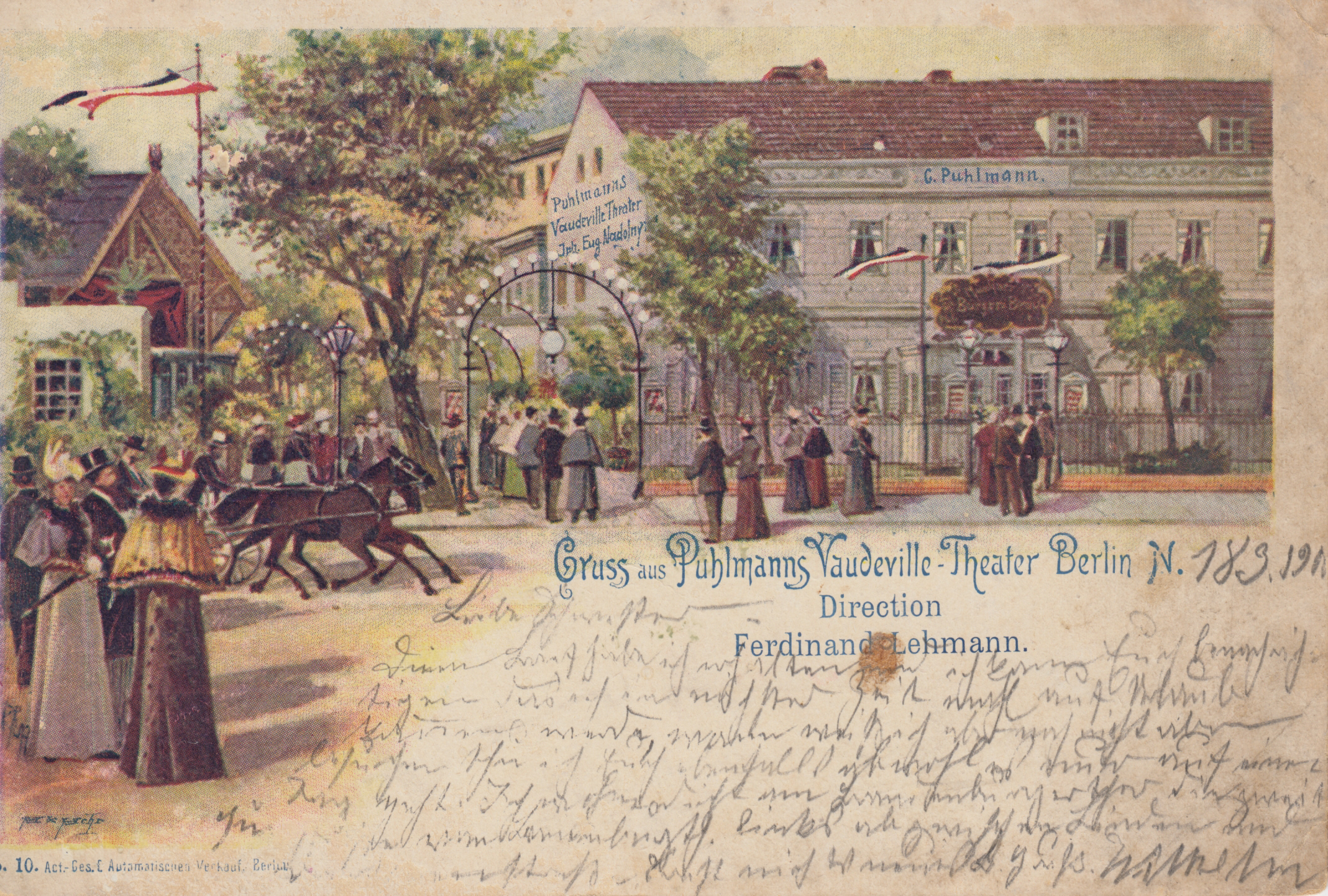 Ansichtskarte "Gruss aus Pulhmanns Vaudeville-Theater Berlin N., Direction Ferdinand Lehmann", gelaufen am 19. März 1900